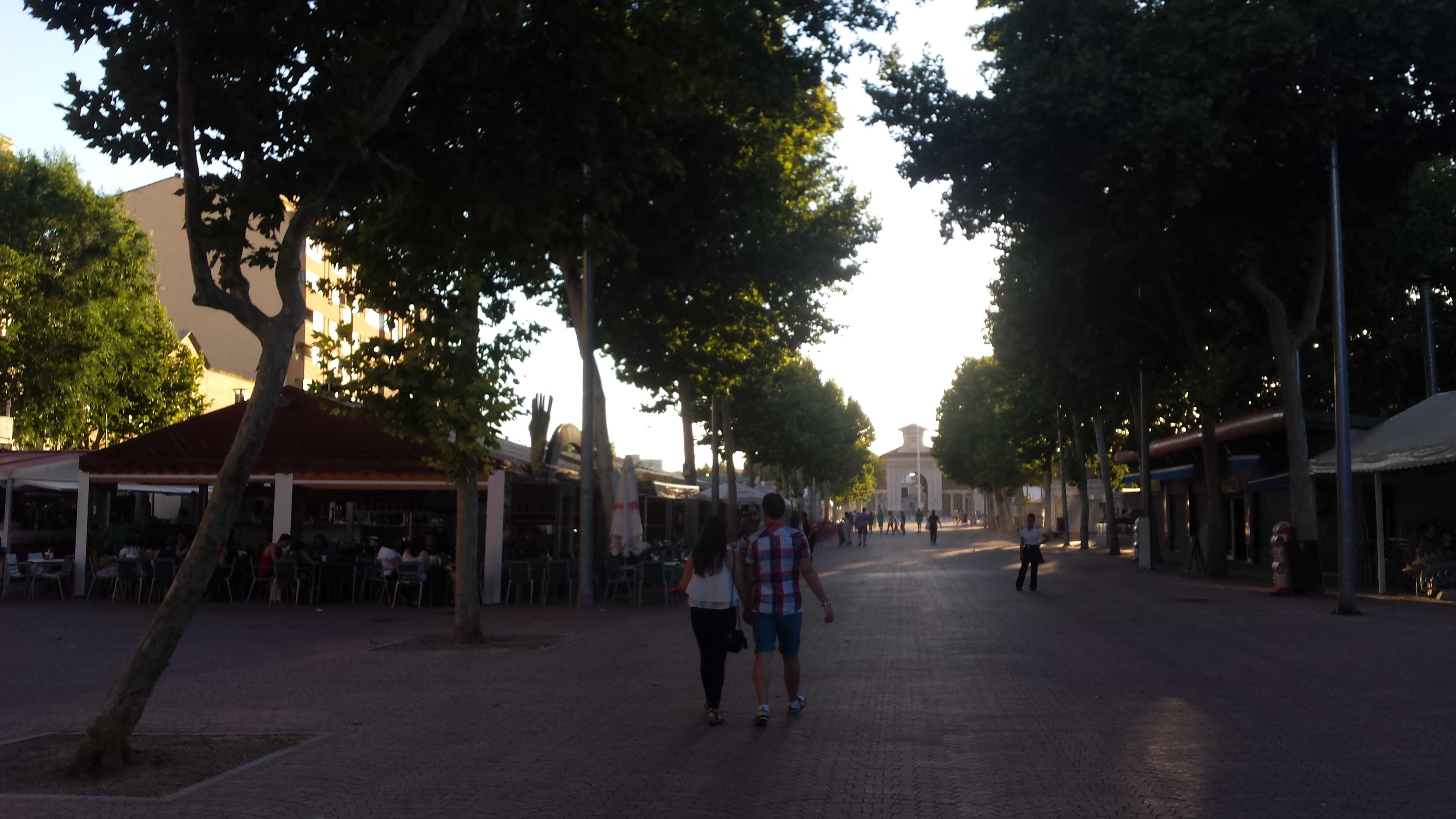 Tascas de la Feria